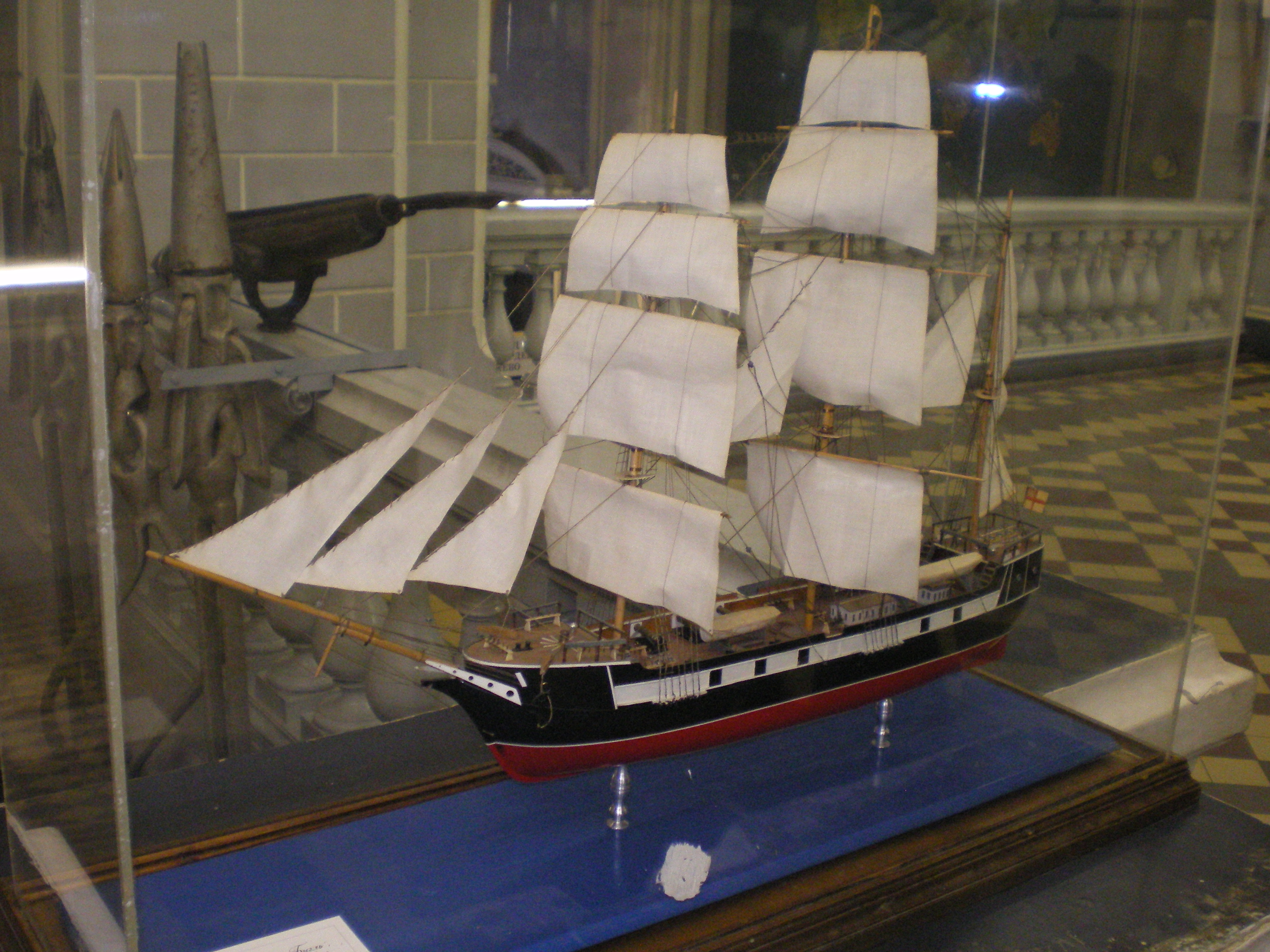 Зоологический музей. Модель корабля Биггль.